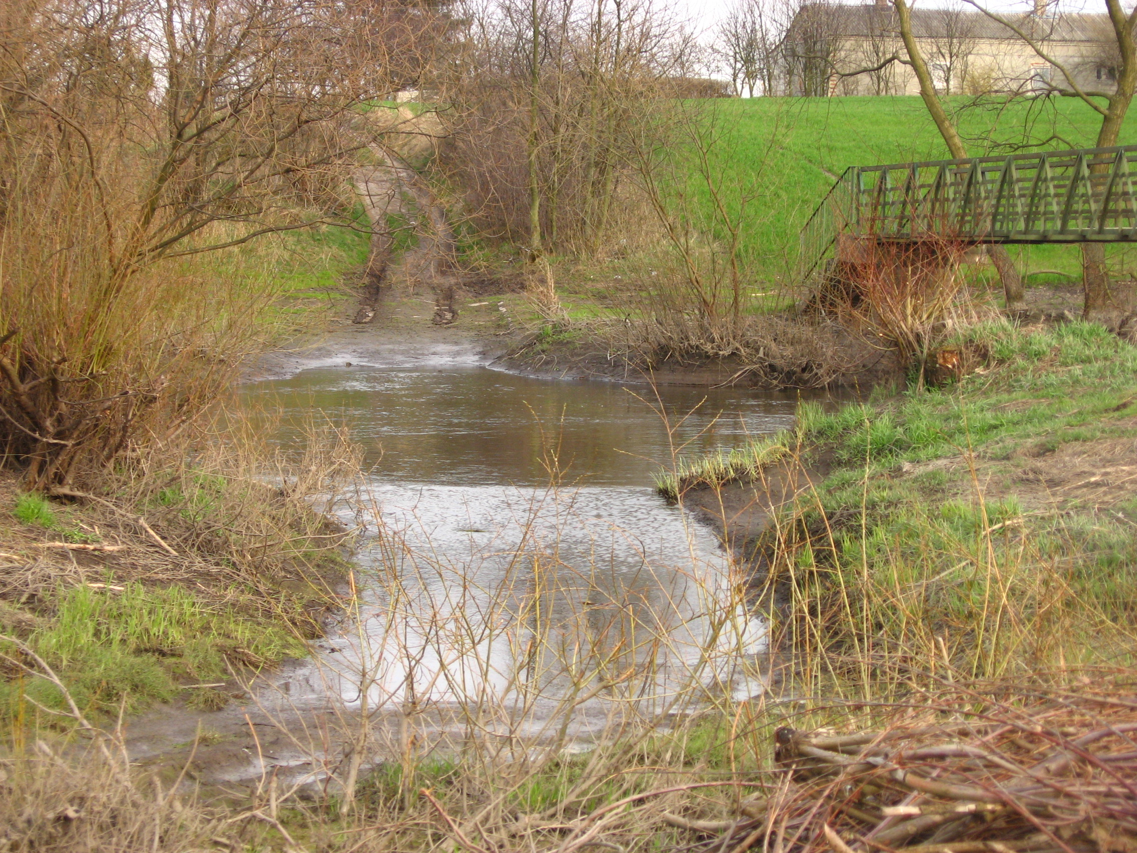 Bród na Huczwie w Obrowcu